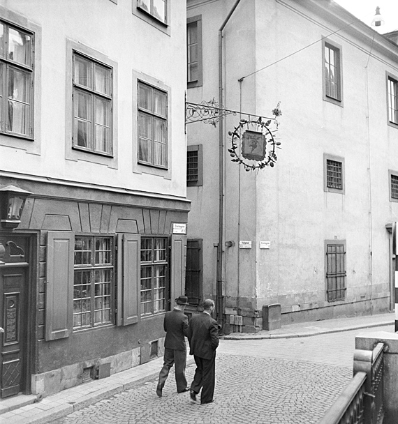 Österlånggatan vid Tullgränd. Restaurang Den Gyldene Freden. Bilden troligen från 1940-talets början. Motiv: Gamla stan Nyckelord: Riksintressen Kategori: Restaurang, Stadsmiljö Österlånggatan vid Tullgränd. Restaurang Den Gyldene Freden. Bilden troligen från 1940-talets början.